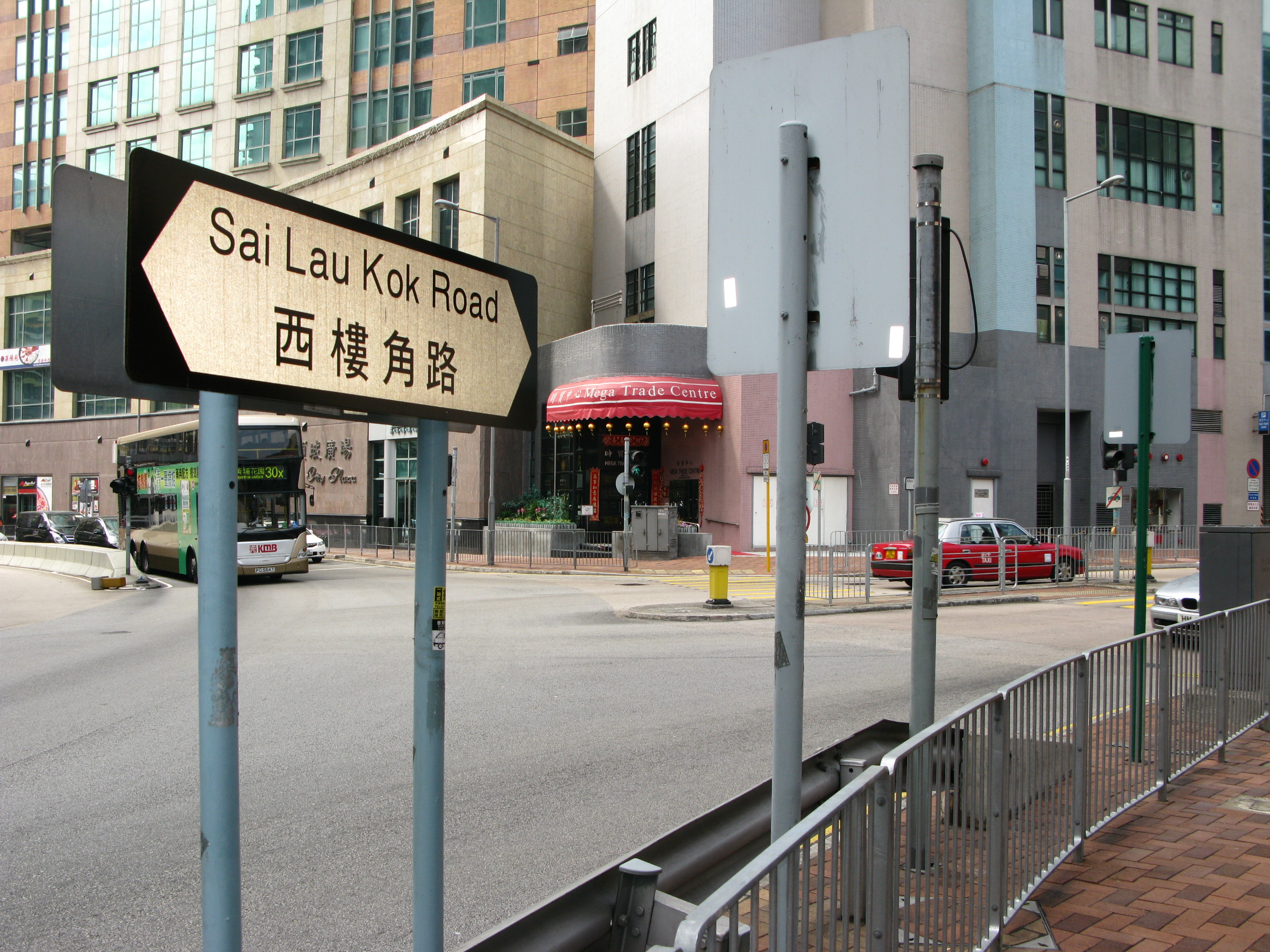 中文（香港）: 香港荃灣西樓角路，近美環街